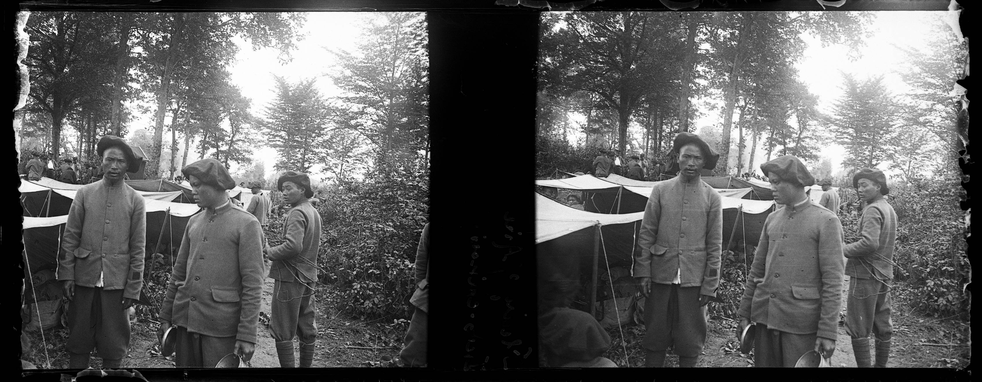 Campement d'Indochinois à Fleury-sur-Aire (Meuse). 25 juin 1916. Guerre 1914-1918.